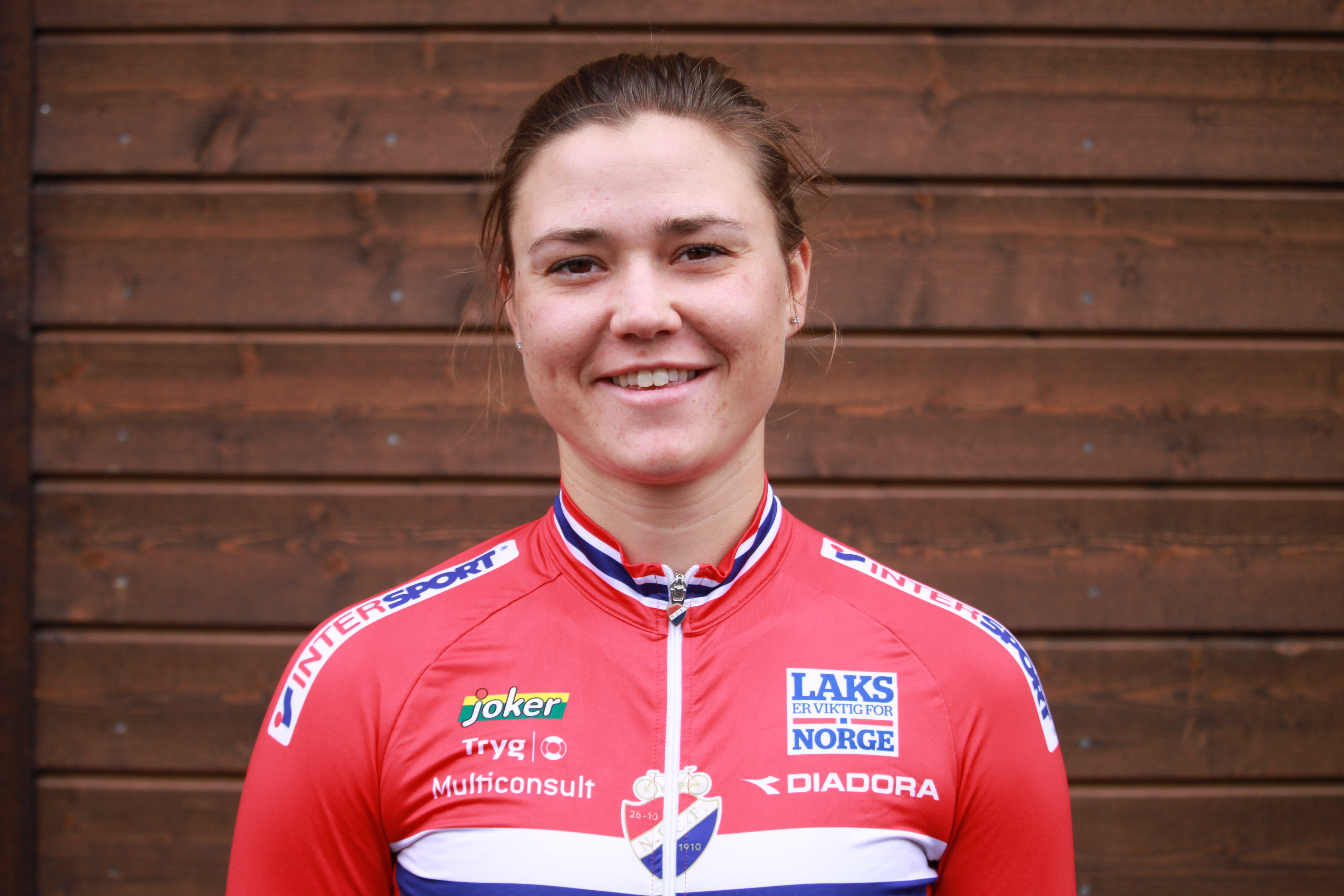 Norske syklisten Line Marie Gulliksen på sykkellandslaget i 2017.